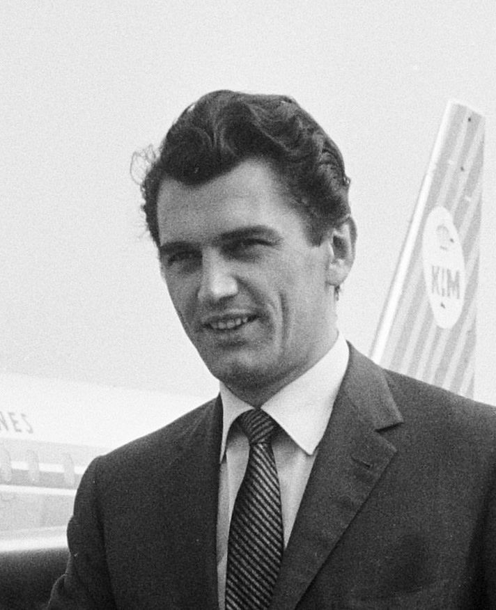 Edmund Prudan bij aankomst op Schiphol